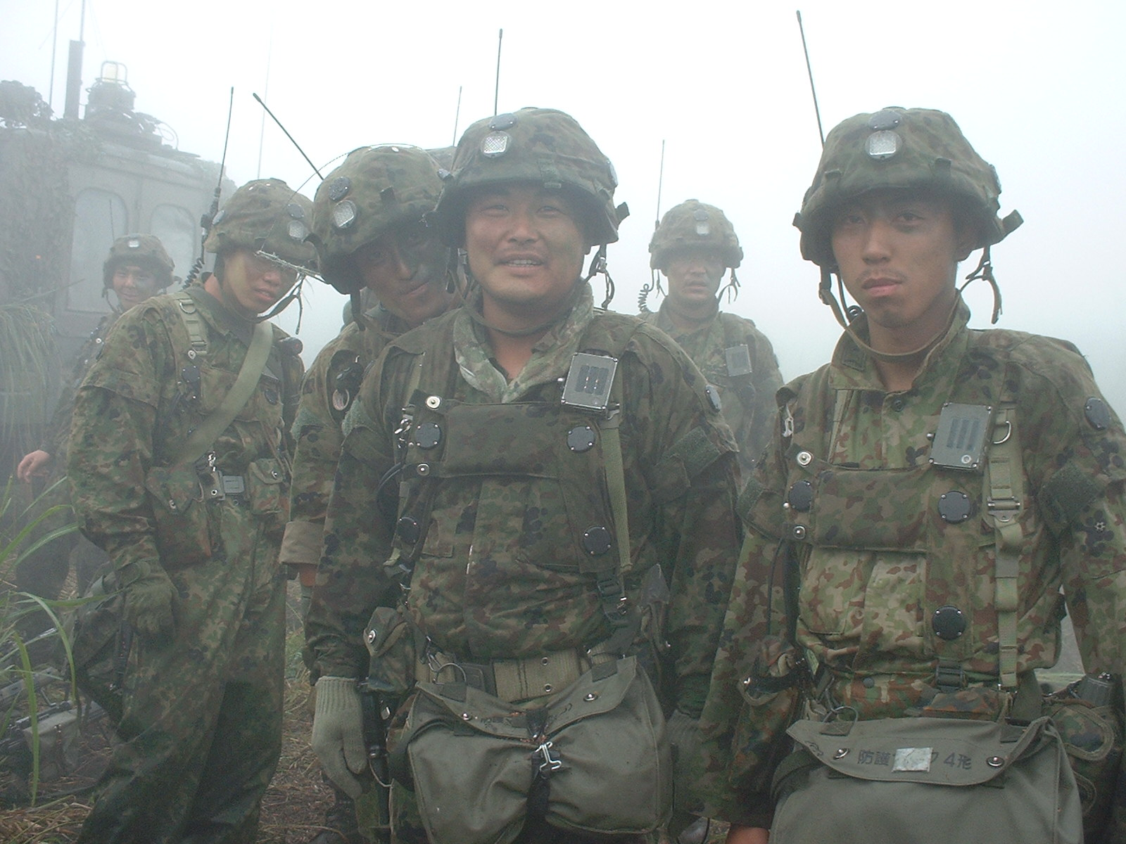 権利者：本人（撮影者よりデータを譲渡）